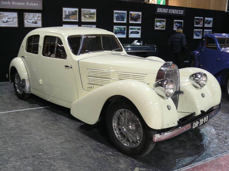 Retromobile 2012